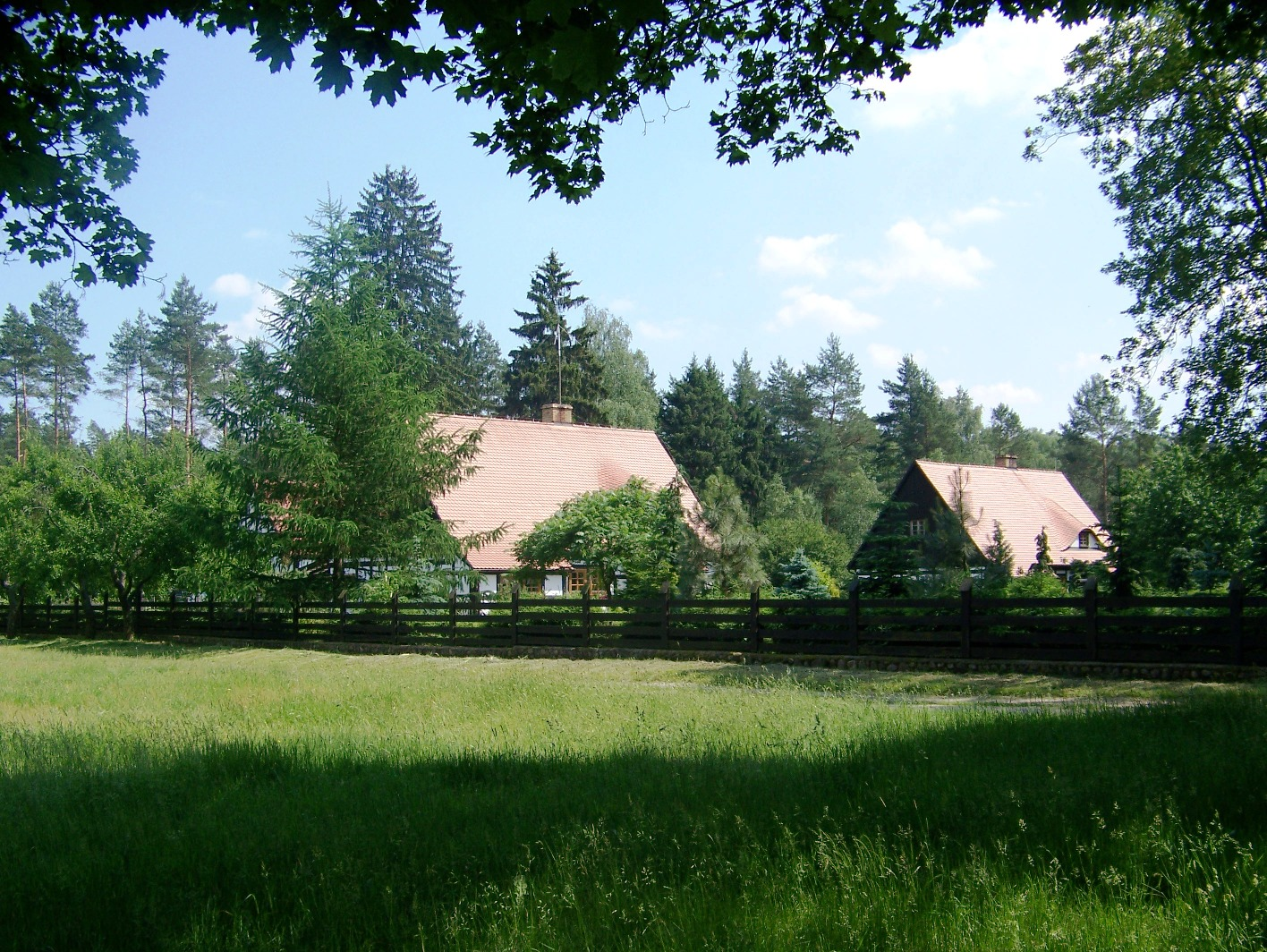 Fragment osady Ostrowiec położonej na terenie Drawieńskiego Parku Narodowego